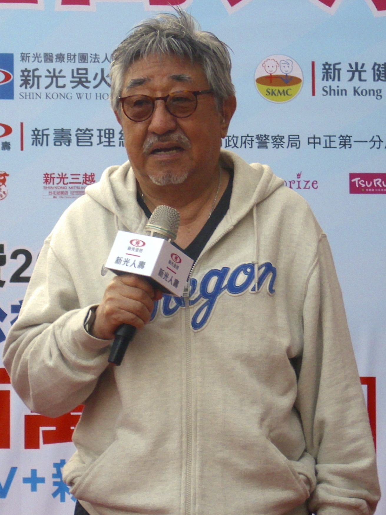 2011 SKL Run Up: Yueh Sun.